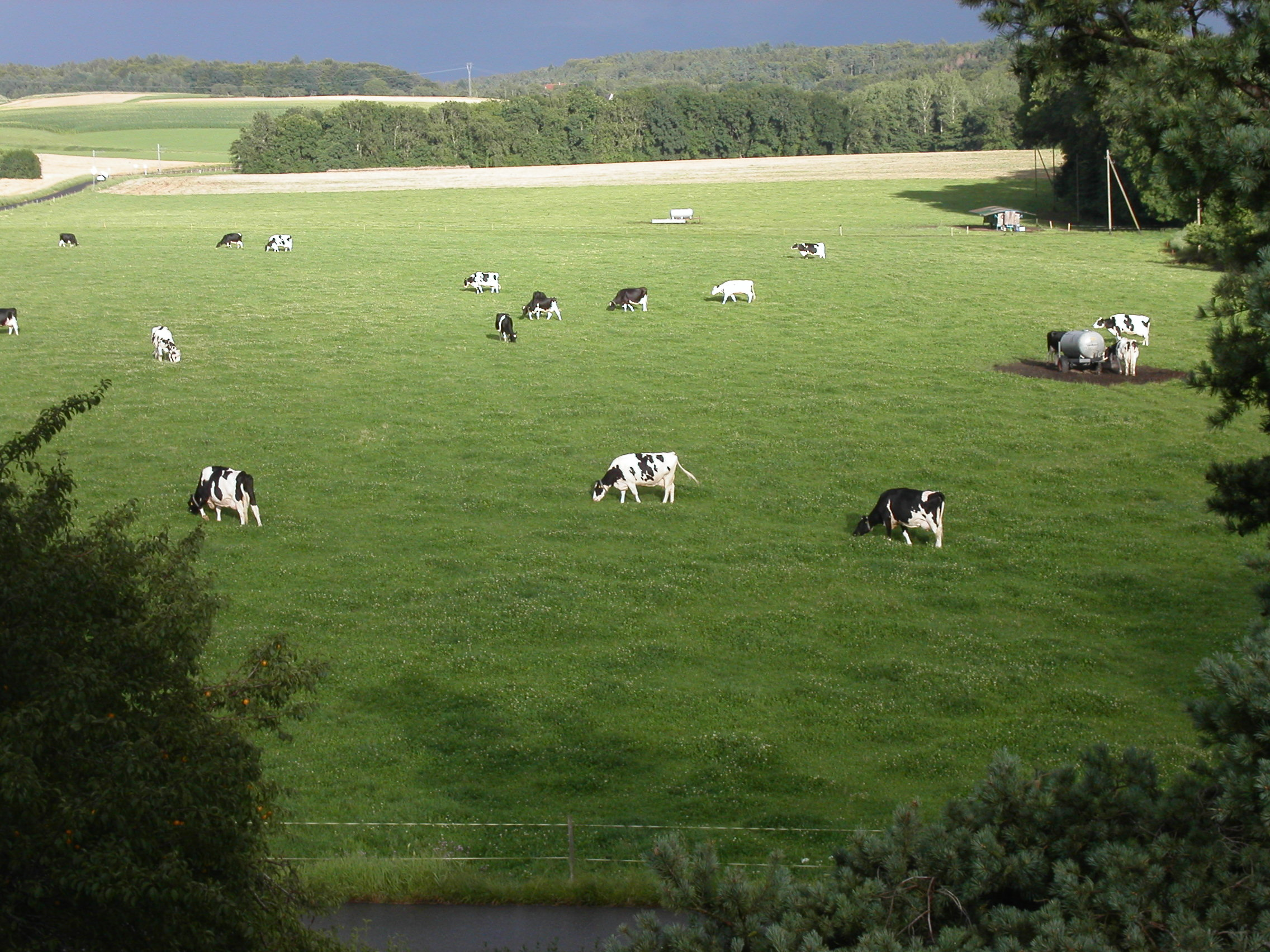 Pré avec des vaches, à Bière, canton de Vaud, Suisse.